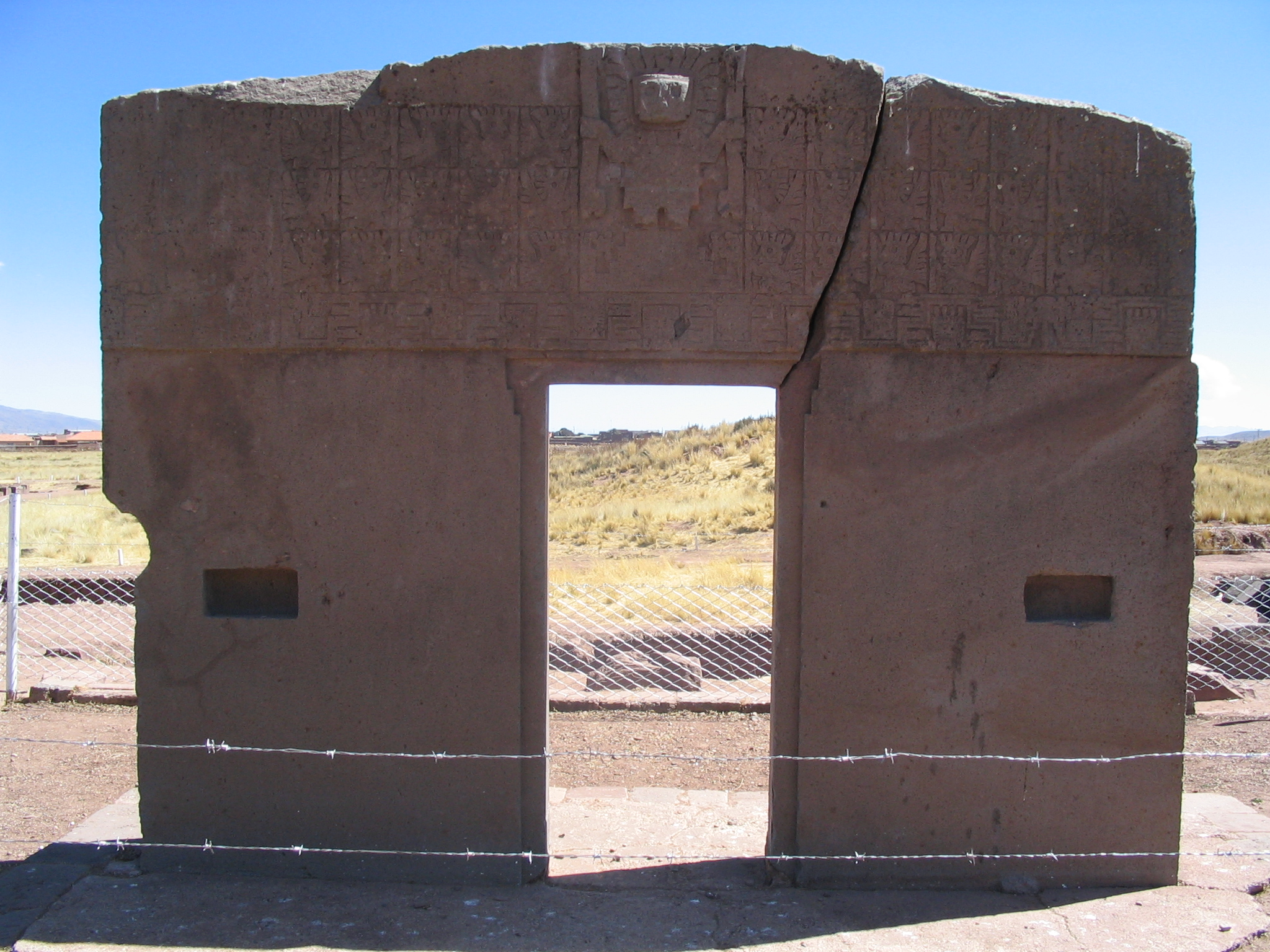 Photo de la porte du soleil de la civilisation Tiwanaku en Bolivie. Photo prise par User:Anakin en 2005.